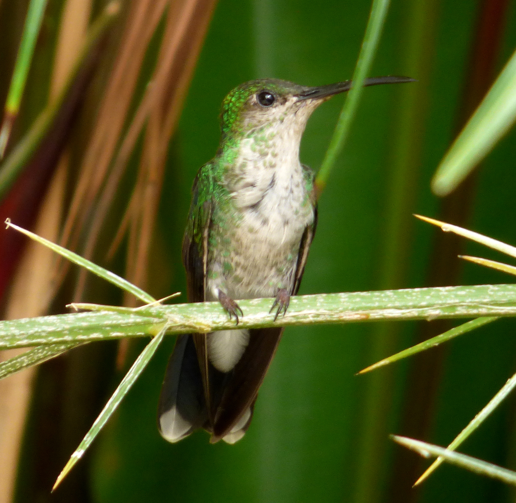 Chalybura buffonii (Colibrí de Buffon) - Hembra